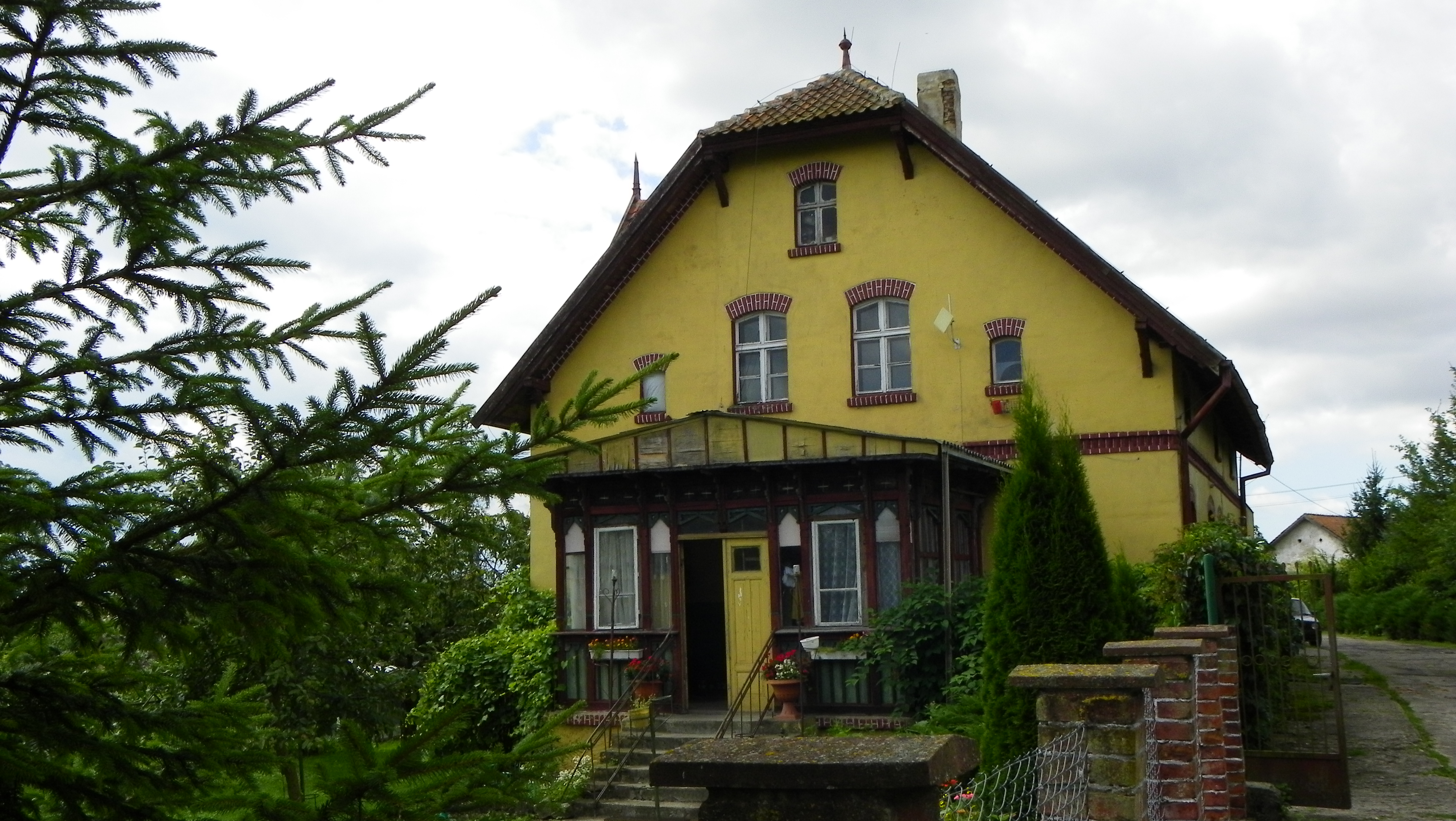 Zabytkowy dworek z pocz. XX w Czarnowcu (województwo warmińsko-mazurskie).